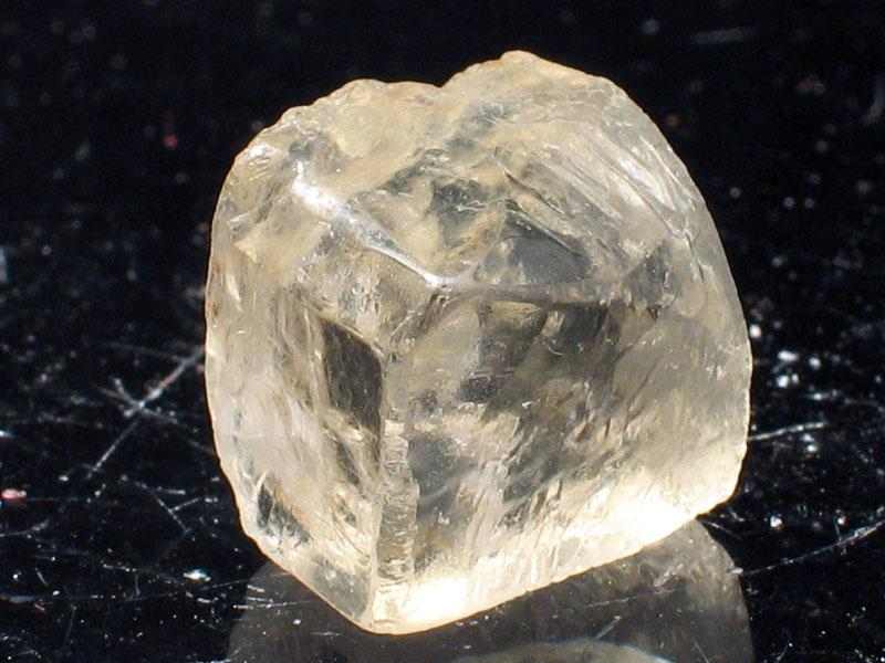 ortoklaz, pochodzenie Madagaskar, autor zdjęcia Stowarzyszenie Spirifer